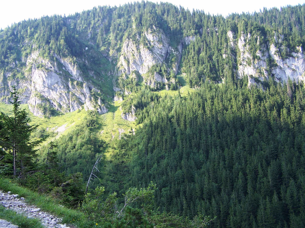 Jaworzyńskie Turnie(Tatra Mountains)